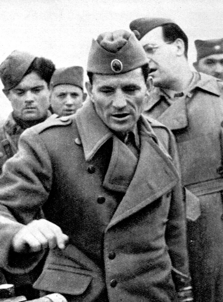 Peko Dapčević na Sremskom frontu.